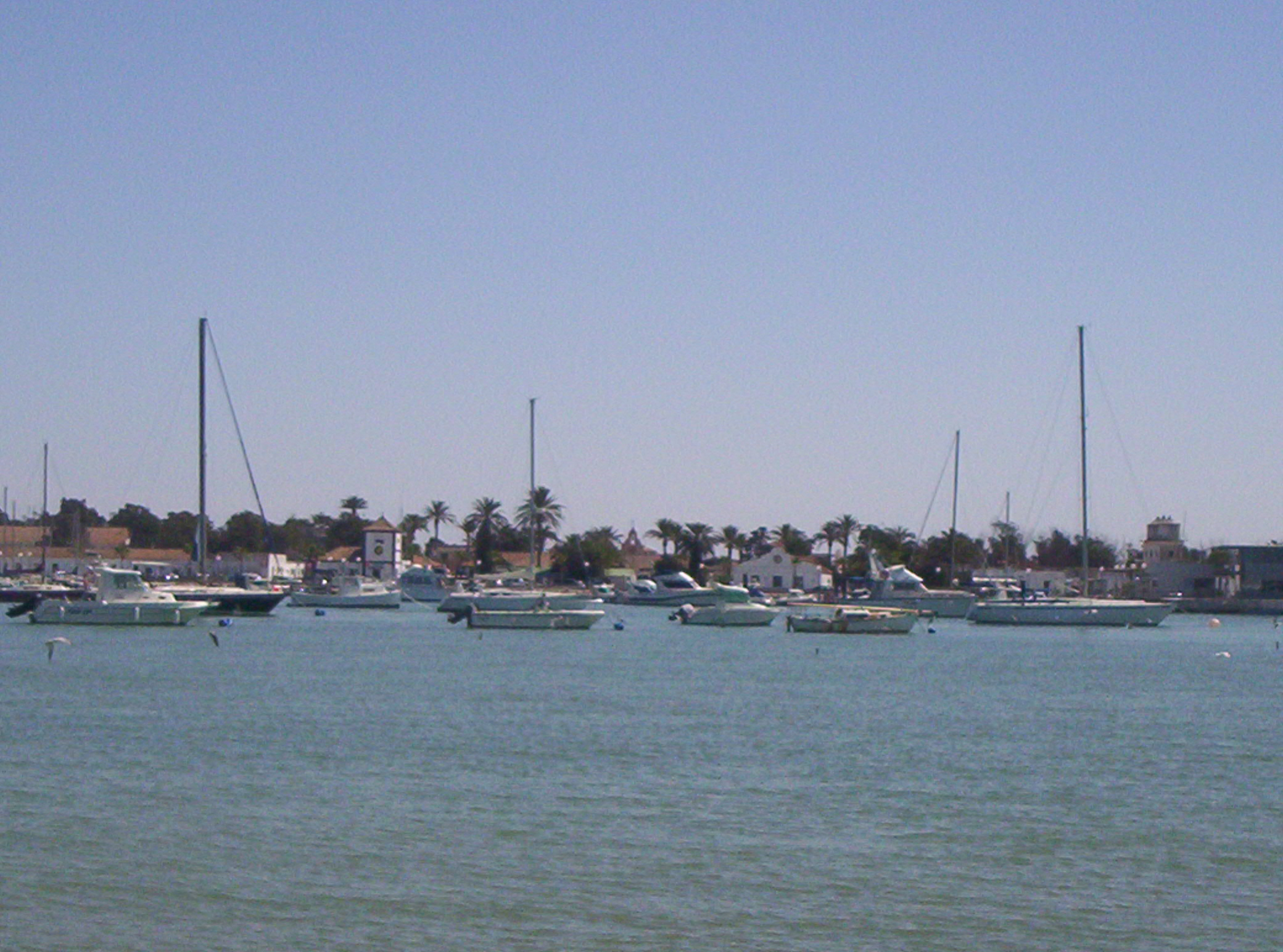 Foto del poblado de Sancti Petri (Cádiz, España), situado en la desembocadura del caño del mismo nombre.